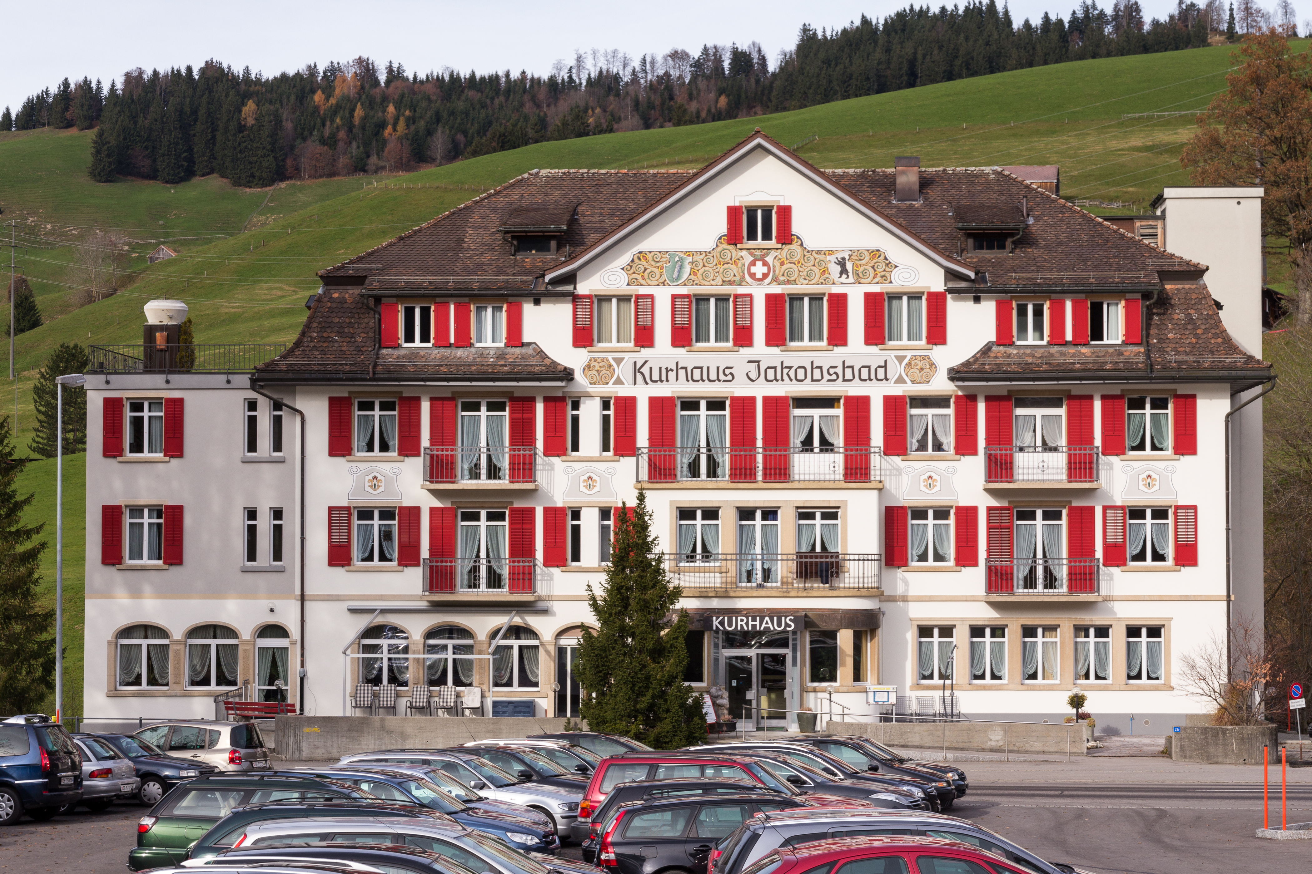 Kurhaus Jakobsbad, Gemeinde Gonten AI